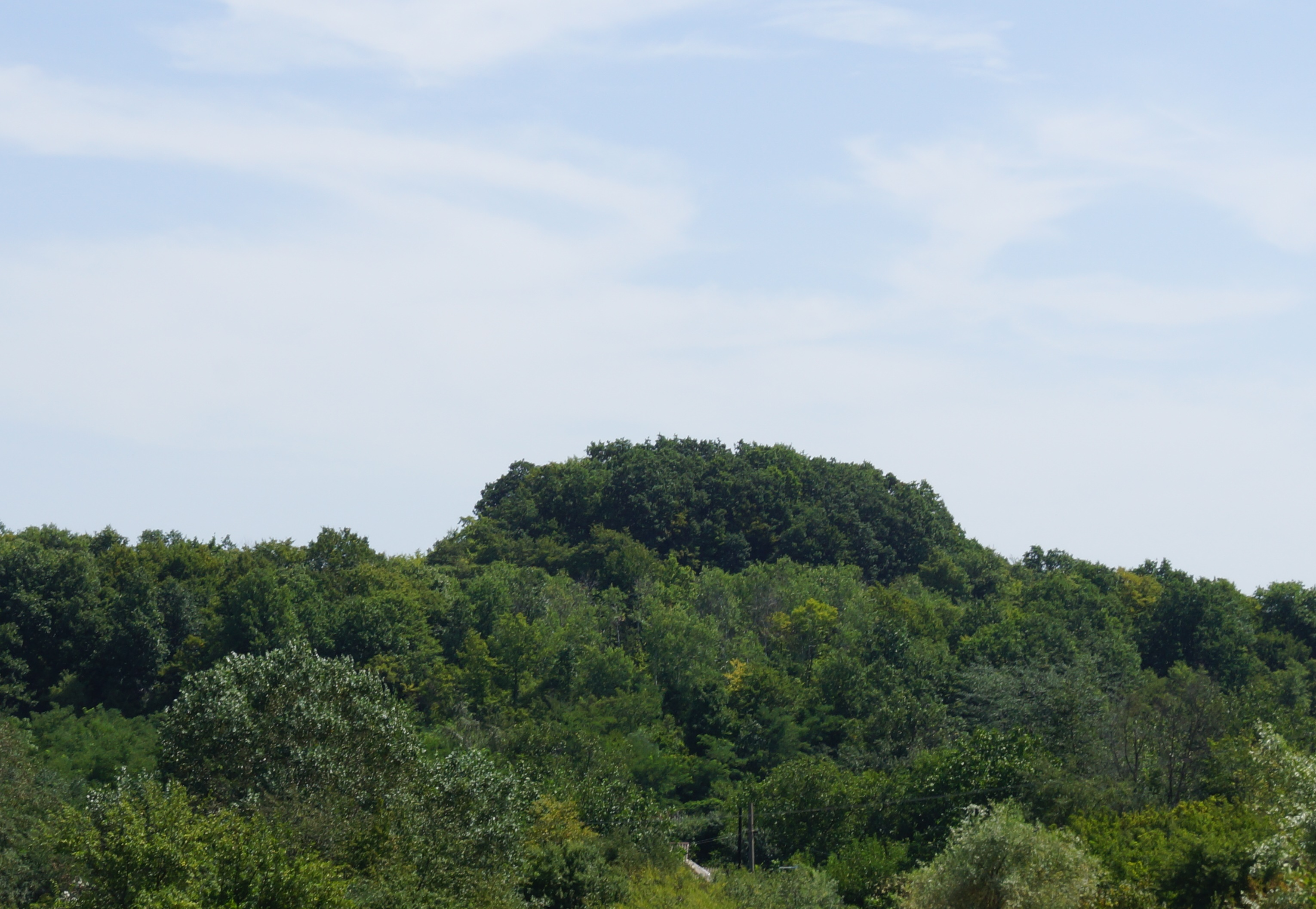 Курган в горах за поселком Черноморским